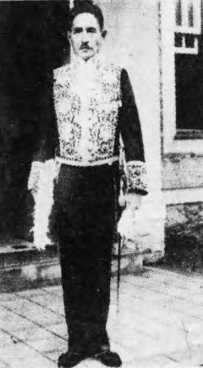 堀田鼎（1883-1942）